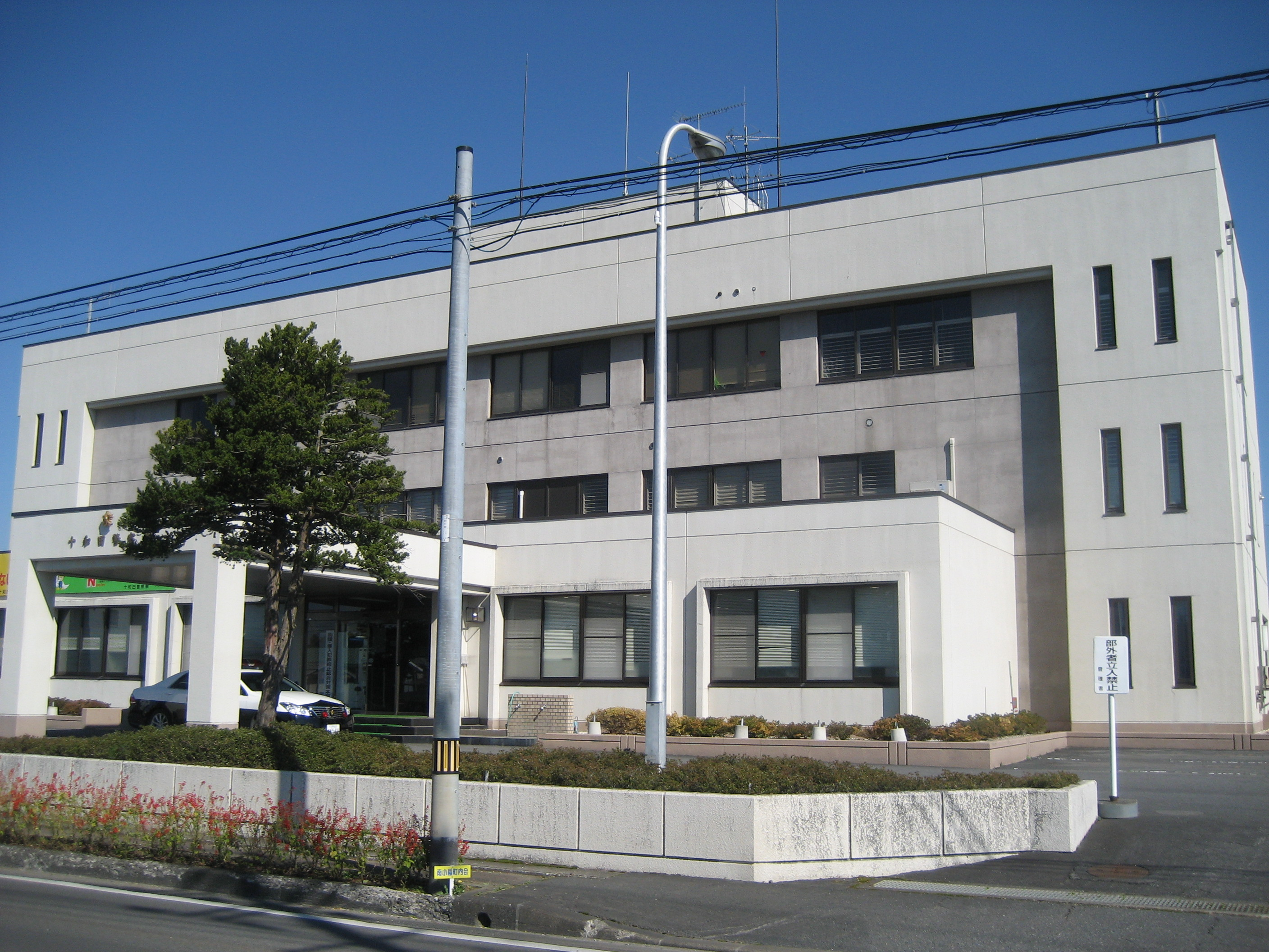 青森県十和田警察署庁舎